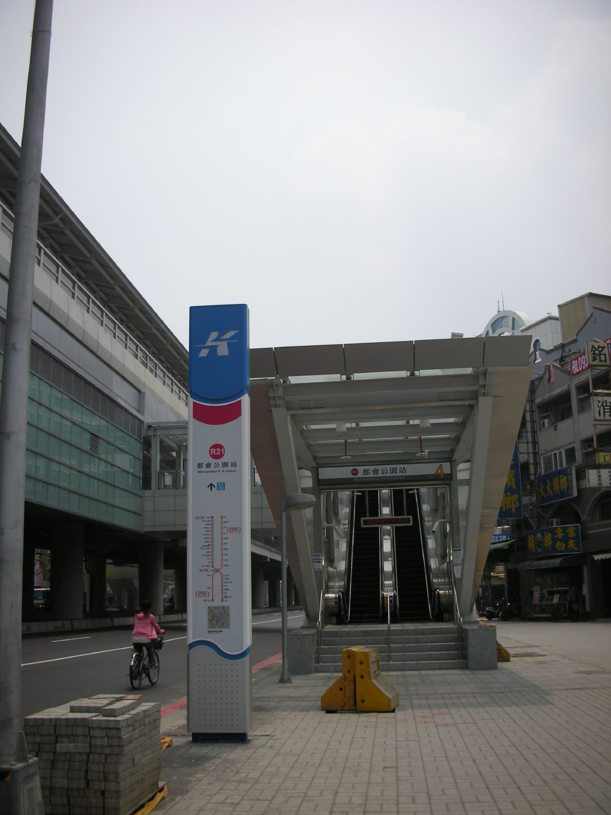 高雄捷運都會公園站4號出口。